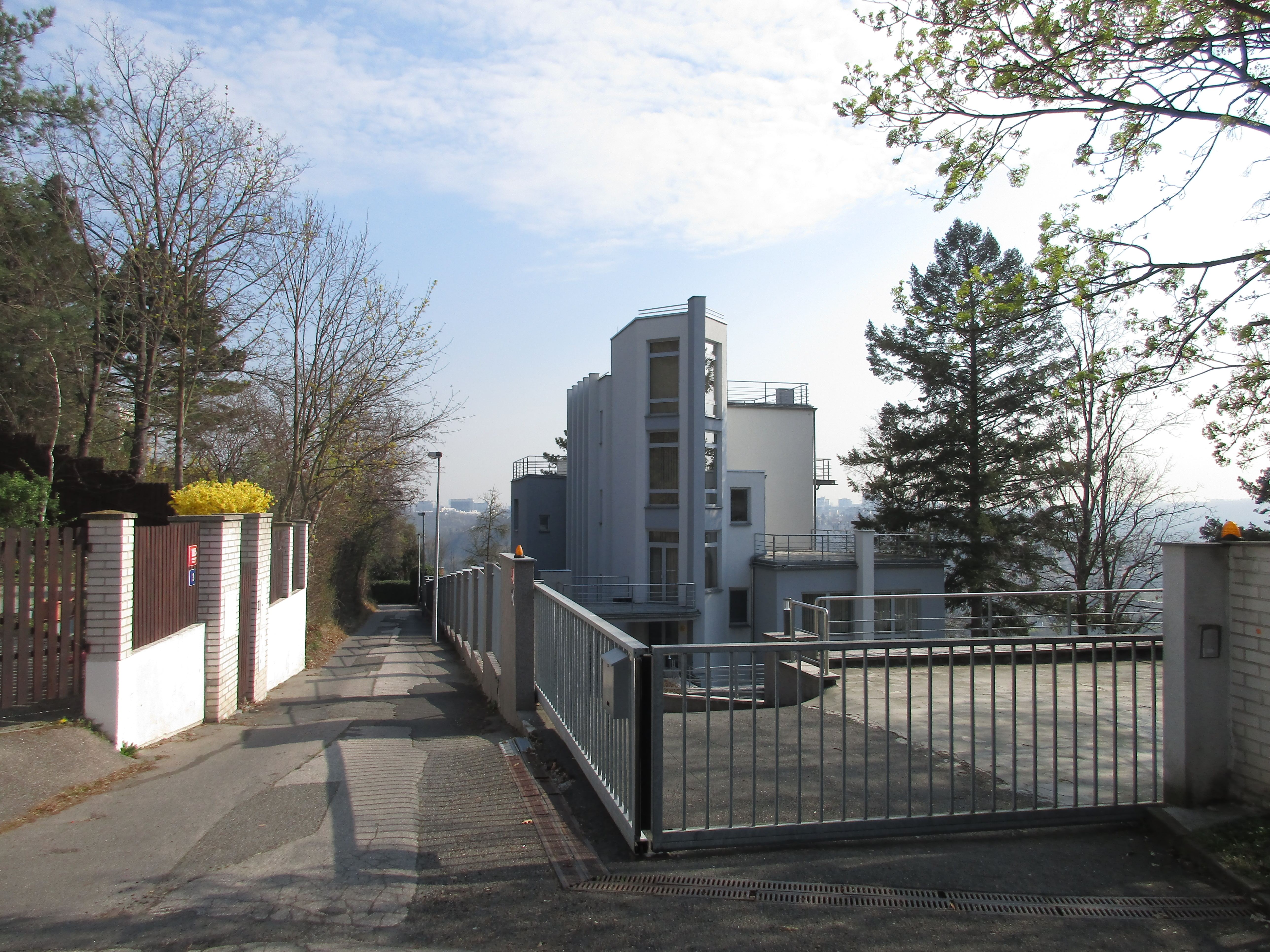 Skalní 176/8, Barrandovská 176/30, Praha 5-Hlubočepy